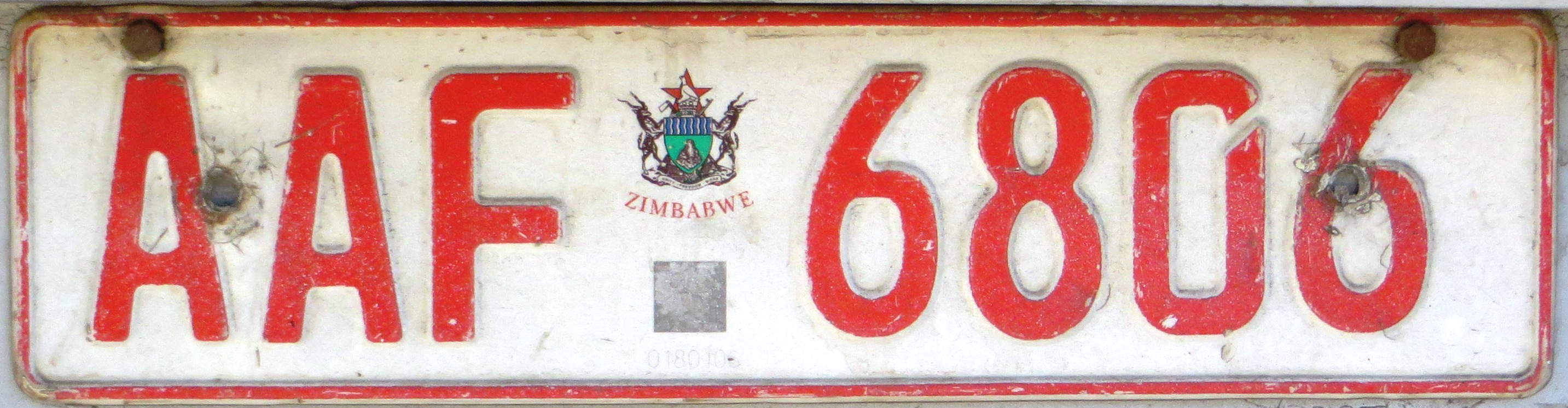 Kentekenplaat uit Zimbabwe